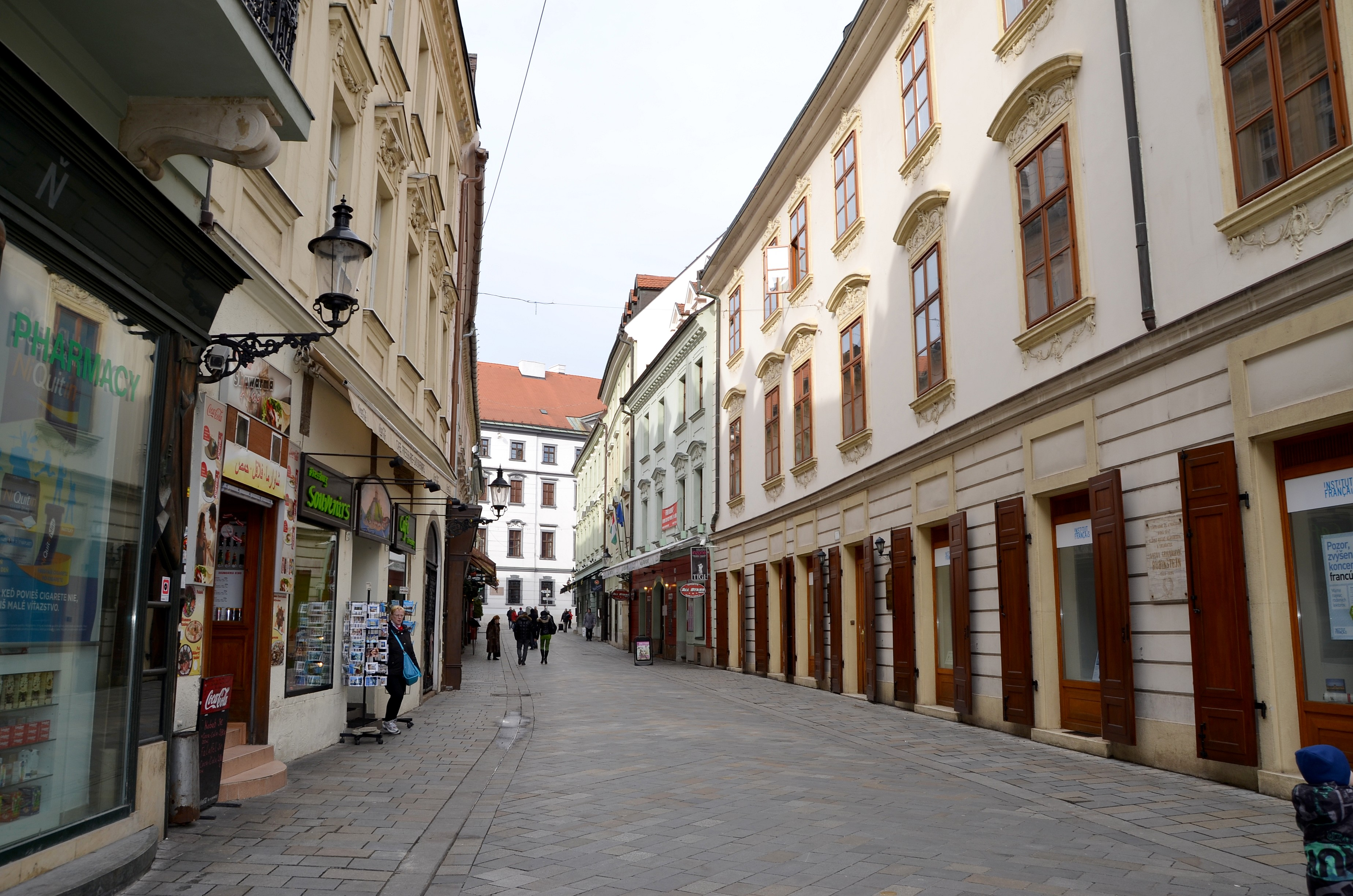 Pohľad do Sedlárskej ulice v Bratislave smerom k Michalskej ulici